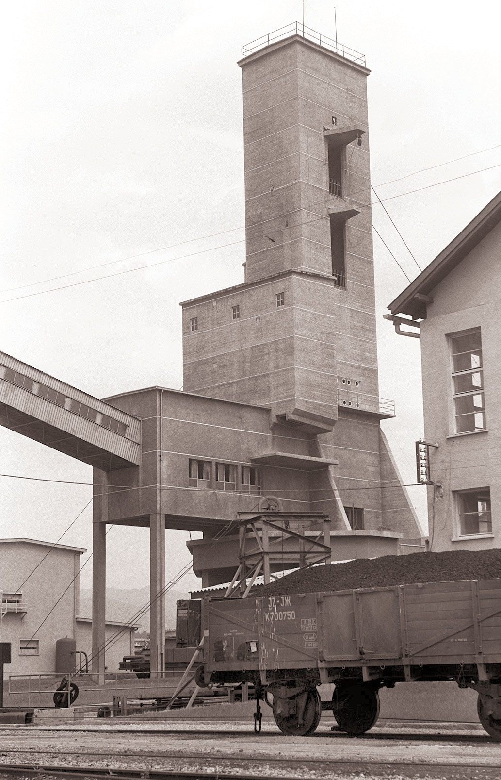 Rudnik Velenje